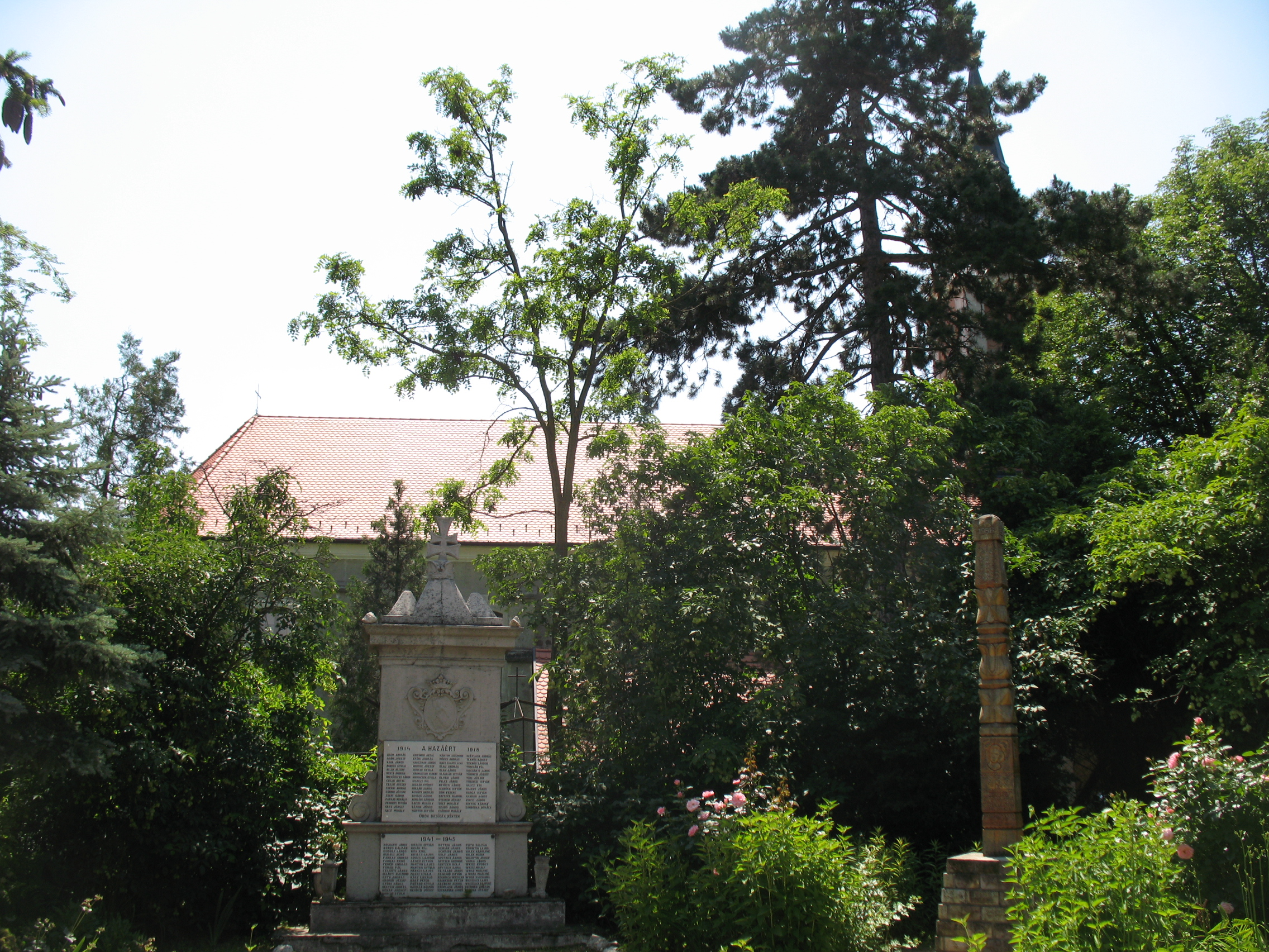 Kosd 2013